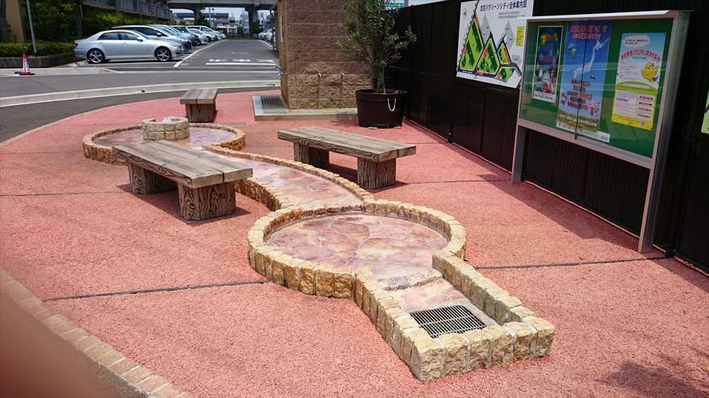 加古川グリーンシティ防災２号井戸